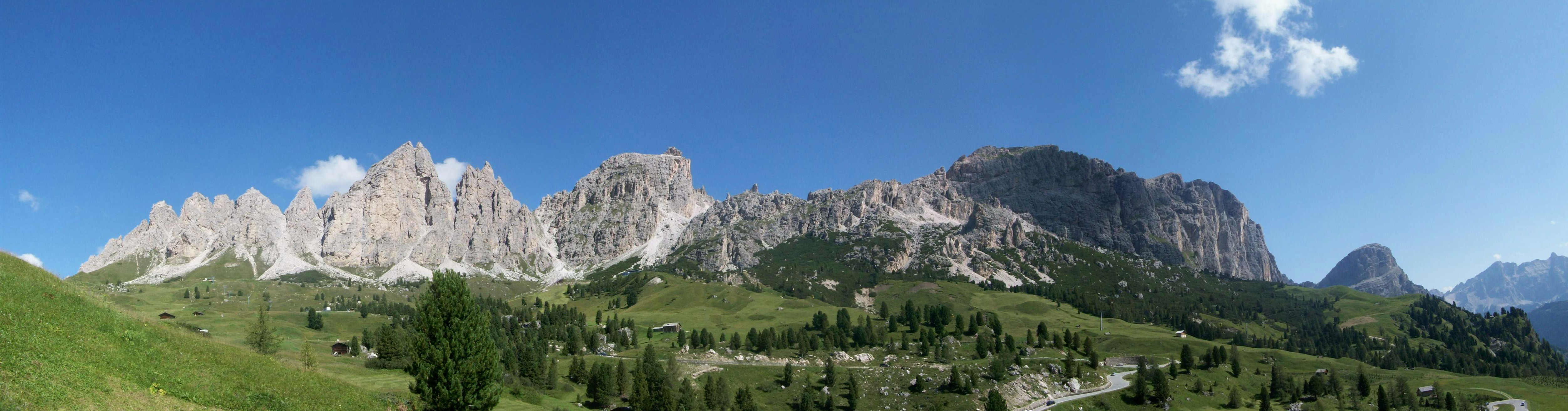 Aussicht etwas östlich des Grödnerjochs: Tschierspitzen, Col Turond, Sass da Ciampac, Sass Songher